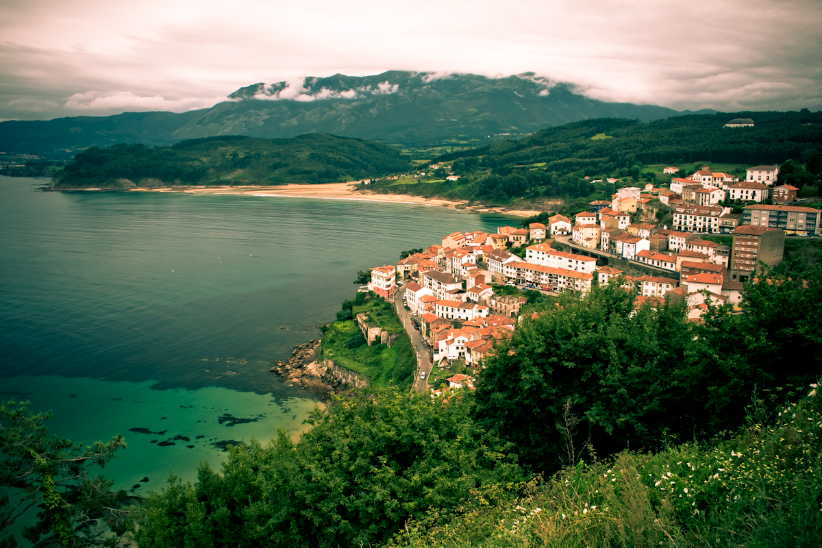 Lastres , pertenece a la Provincia de Asturias